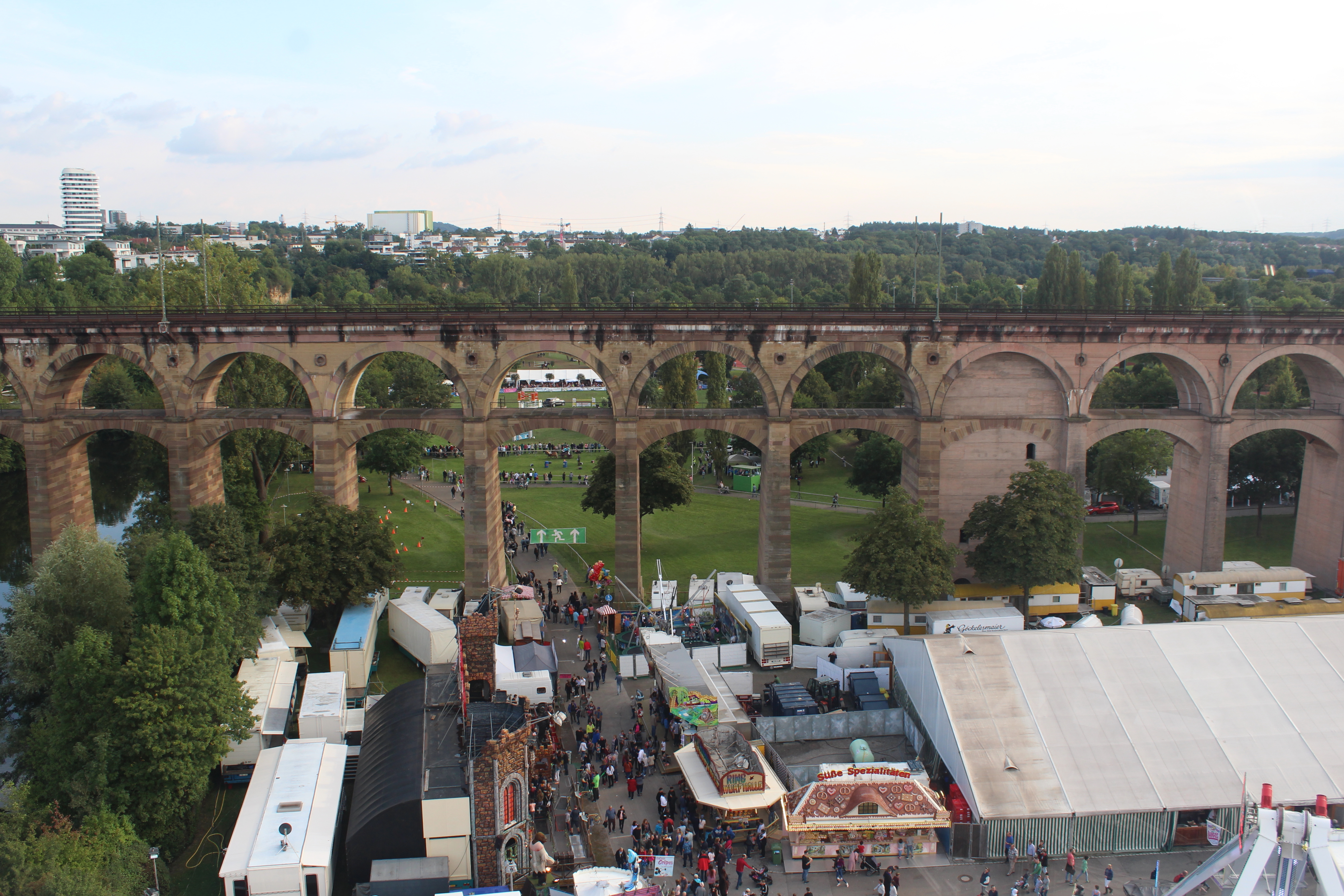 Bietigheimer Pferdemarkt 2017 mit dem Enzviadukt